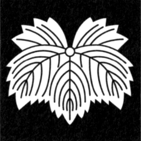 鬼蔦